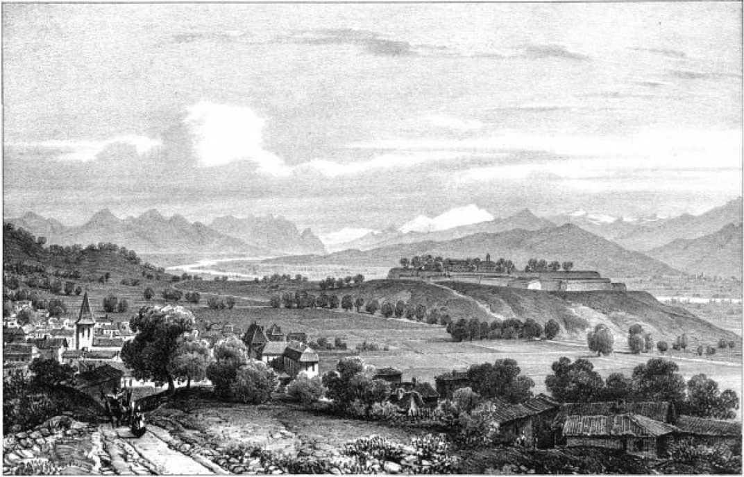 Album du Dauphiné - tome IV, litographie de Barraux, Isère